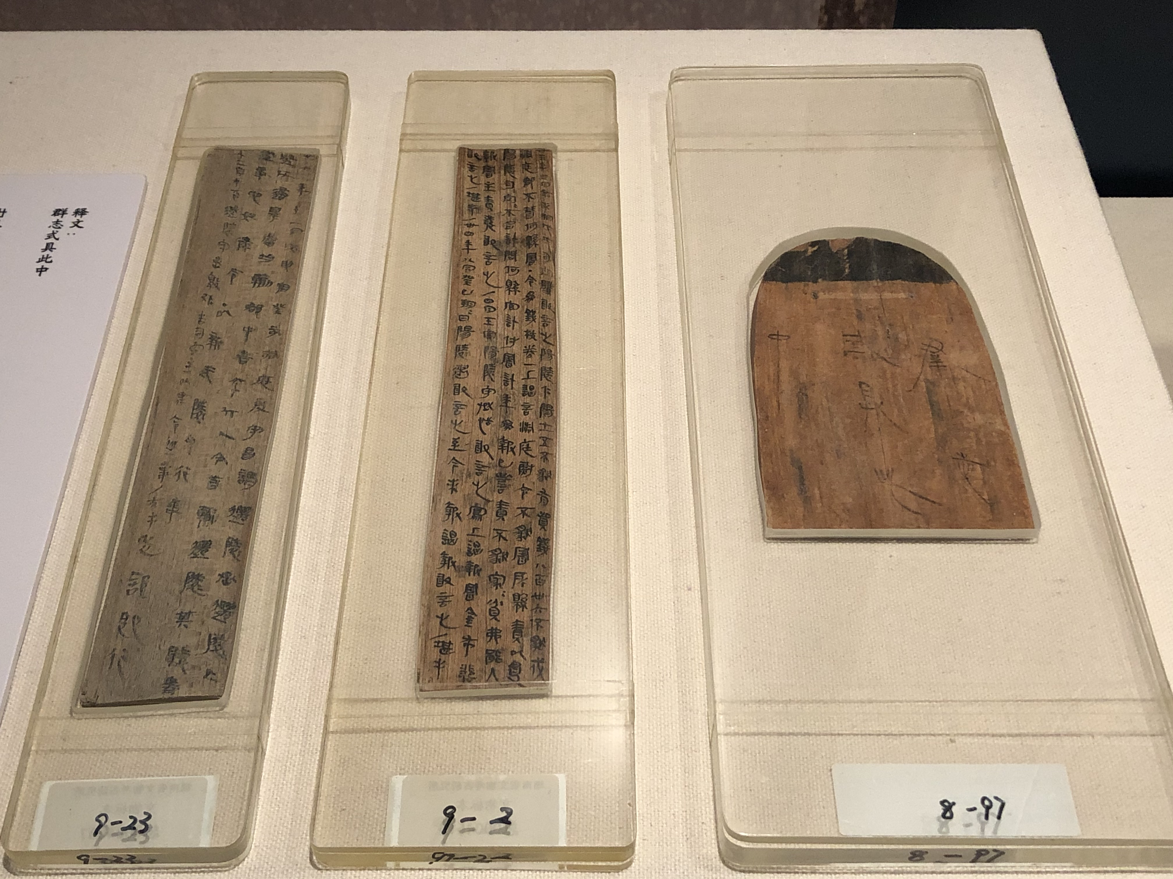 里耶秦代簡牘